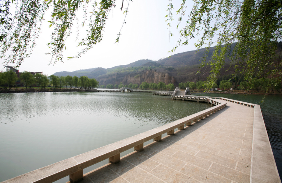 xiaolangdi